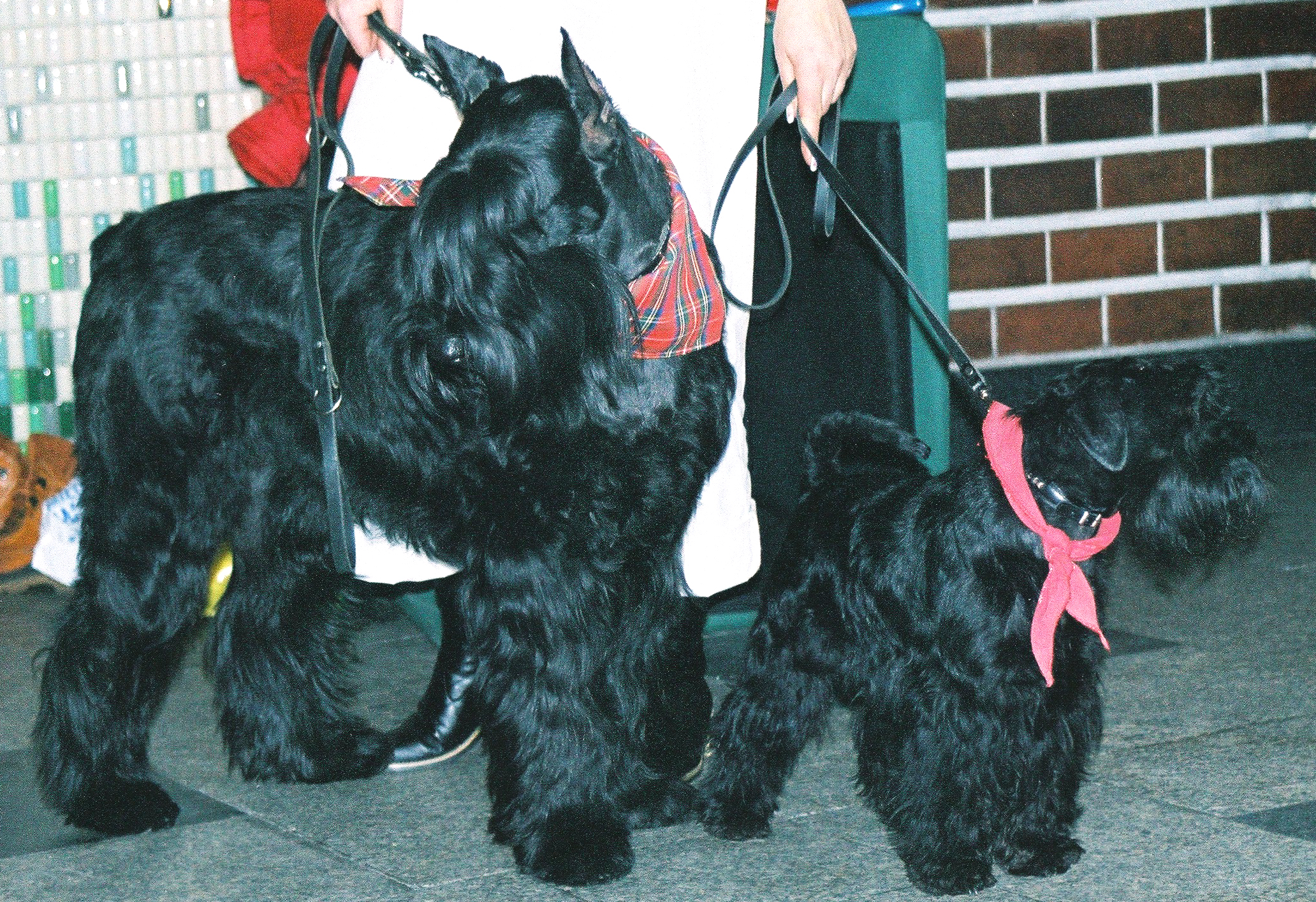 autor: Pleple2000 15:02, 5 April 2006 (UTC)